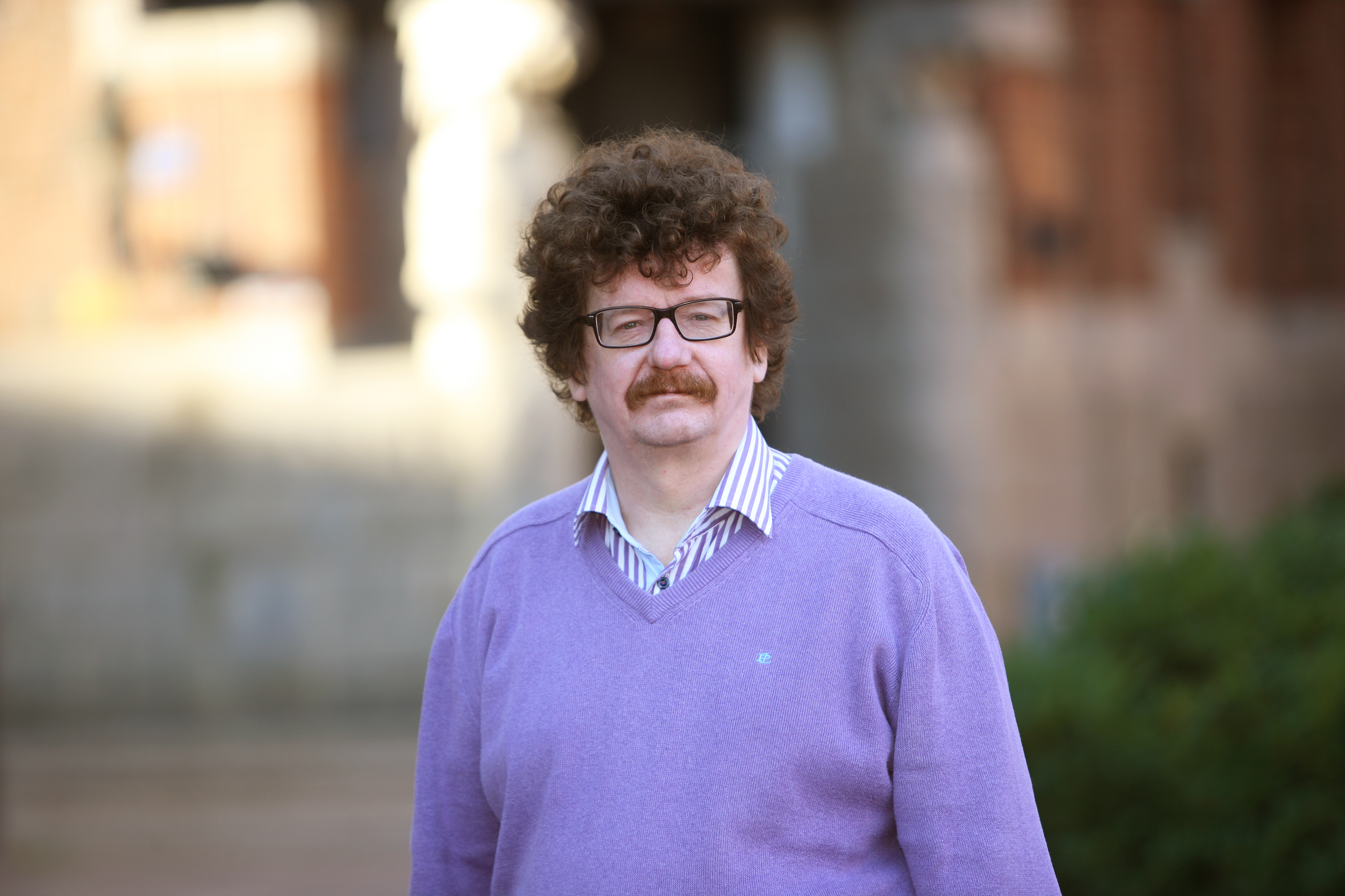 Lars Stjernkvist